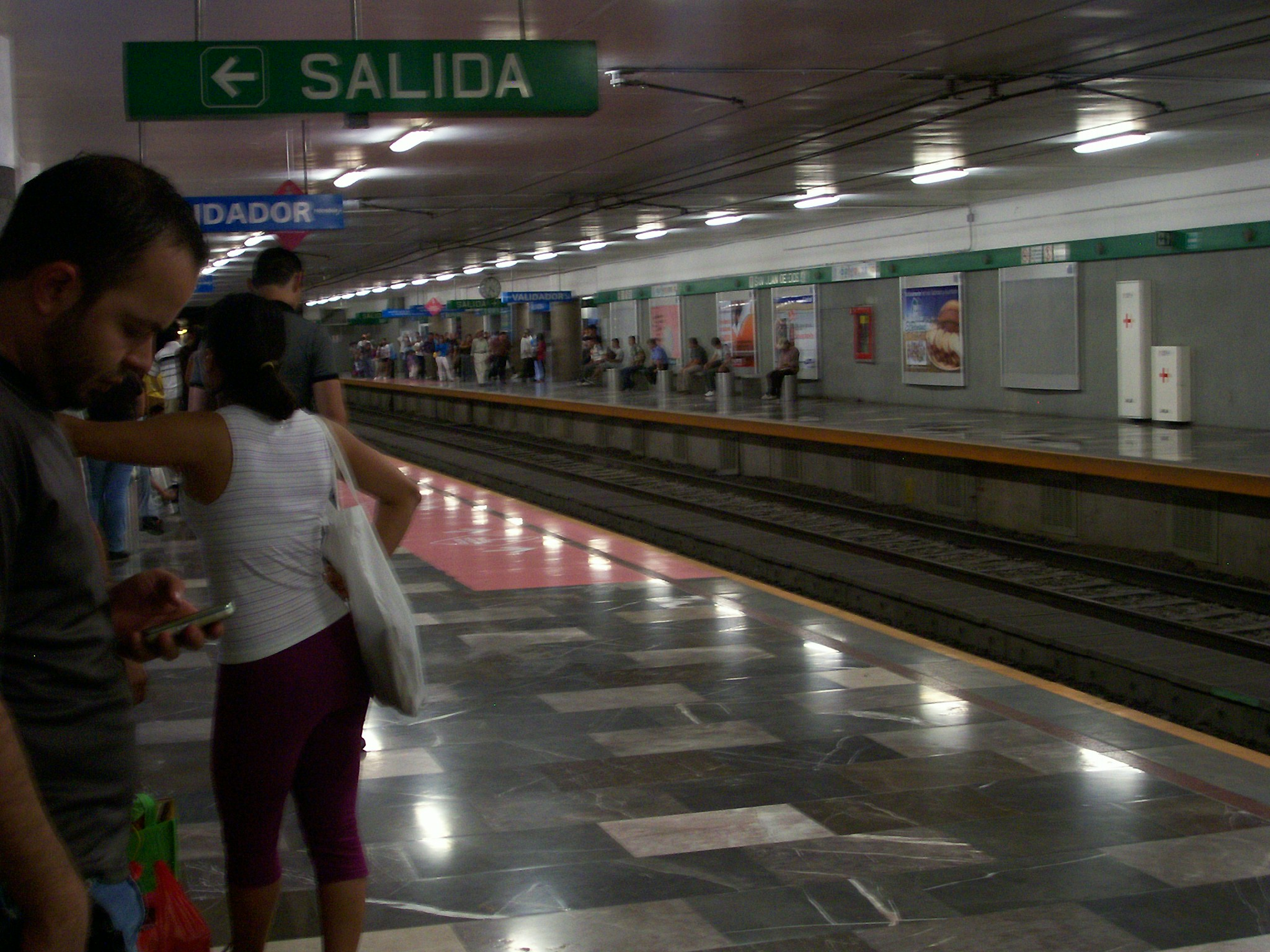 Estación San Juan de Dios del tren ligero/metro de Guadalajara